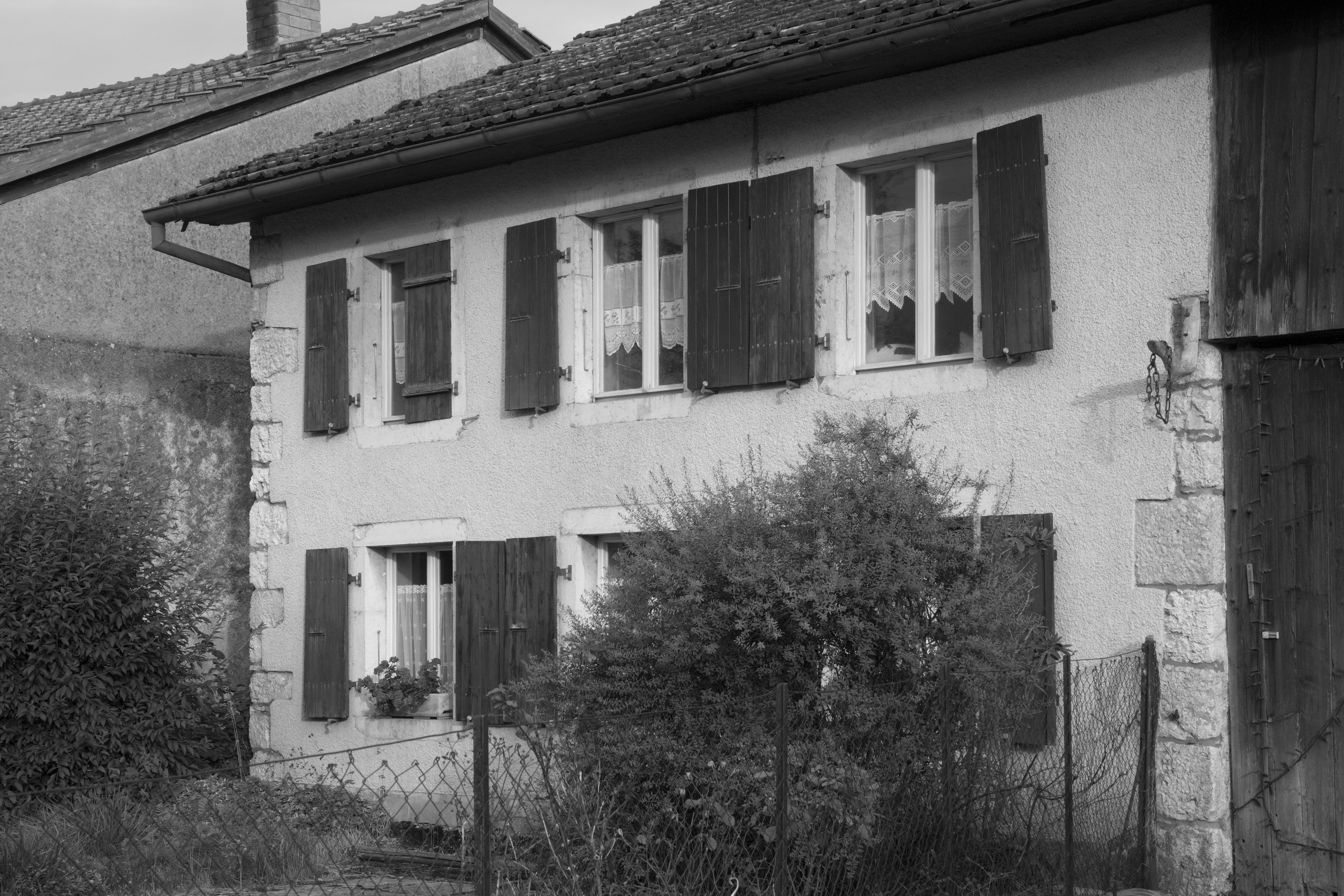 Wohnhaus im Zentrum von Bassecourt, Schweiz